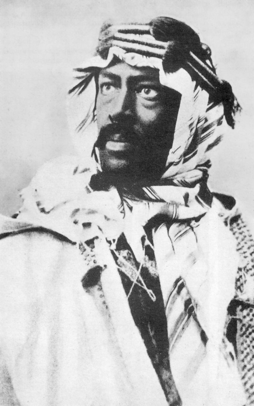 The Russian actor and director Constantin Stanislavski (Константин Сергеевич Станиславский) as William Shakespeare's Othello (1896)